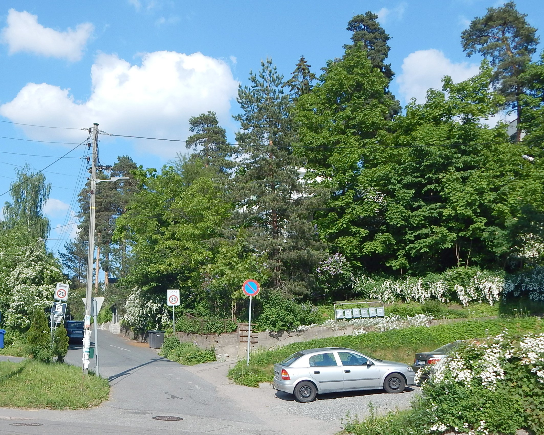 Haråsveien